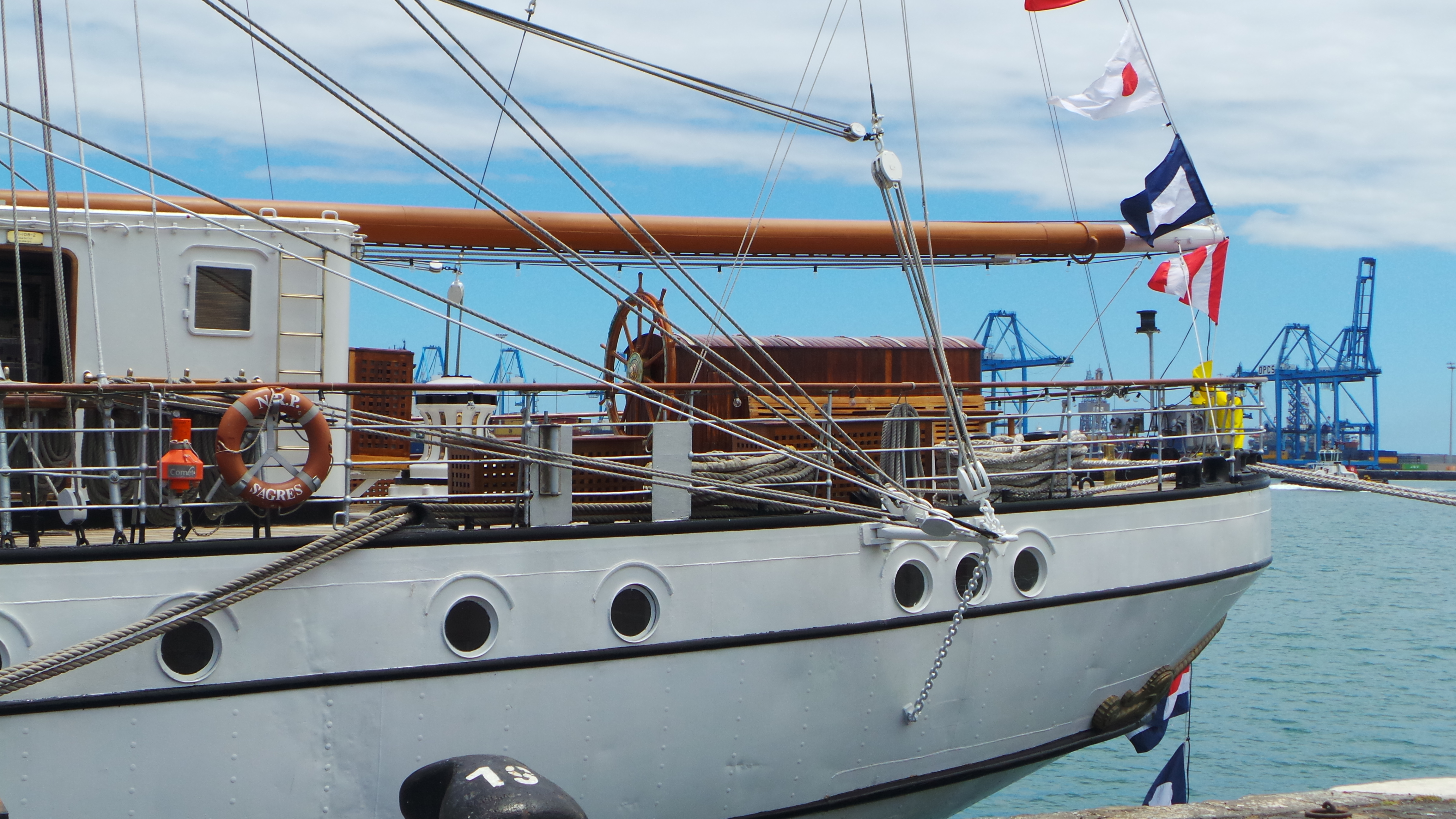 Visita al Buque Escuela NRP Sagres, en La Base Naval de Las Palmas de Gran Canaria. Este fin de semana de semana ( 20, 21 y 22 de junio de 2014) tenemos la oportunidad de disfrutar, en Las Palmas de Gran Canaria, de la visita del buque escuela portugués NRP Sagres, se encuentra atracado en el muelle de la base naval y podrá ser visitado hoy viernes hasta las 19h y mañana sábado de 10 a 12h y de 14 a 19h . El Buque proveniente de Lisboa partirá el domingo hasta Las Azores , para luego regresar a Lisboa, cuenta con unos 60 guardiamarines, con una decena de mujeres entre ellos, que realizan su periodo de instruccion Construido en 1937 en Hamburgo y tras varios avatares, fue adquirido en 1961 por la marina Portuguesa para sustituir al Sagres II, entrando en servicio como Sagres III en febrero de 1962. Tiene 89,5 metros de eslora, 12 de manga y 5,5 de calado, siendo su altura máxima de 45,5 metros. Cuenta además con 1.971 metros cuadrados de vela y desplaza 1.893 toneladas. La figura del mascarón de proa del Sagres III es el Infante D. Henrique nacido el 4 de marzo de 1394, siendo uno de los impulsores de la expansión y descubrimientos portugueses de la época. Más información del Buque : Web del Buque